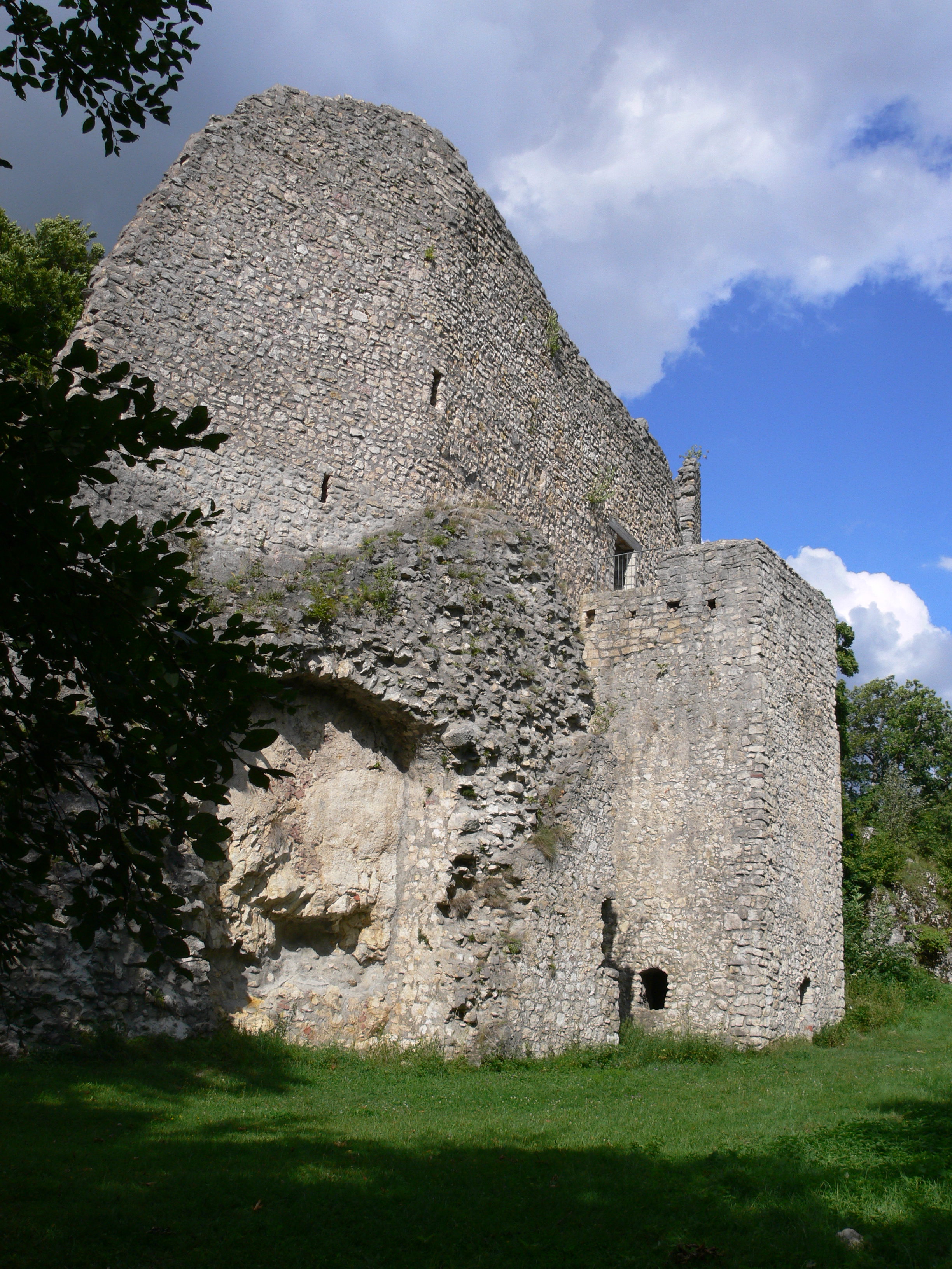 Burgruine Falkenstein über dem Donautal